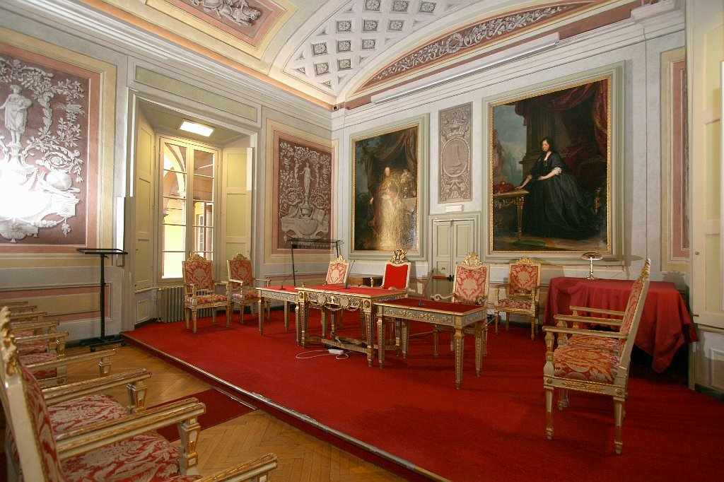 A pianta rettangolare, fu realizzata nel 1775 su progetto di Giuseppe Piermarini e per volere di Maria Teresa d'Austria che desiderava una sala per la cerimonia delle lauree. Gli affreschi furono eseguiti dal pittore Paolo Mescoli nel 1782-83, mentre i due grandi ritratti ad olio raffiguranti Maria Teresa e Giuseppe II furono eseguiti a Vienna da Hubert Maurer. L'Aula è intitolata al poeta Ugo Foscolo, che qui fu docente di Eloquenza italiana e latina.